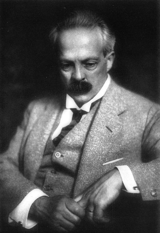 Hermann Obrist (1862–1927), Zeichner, Möbel Designer, Bildhauer